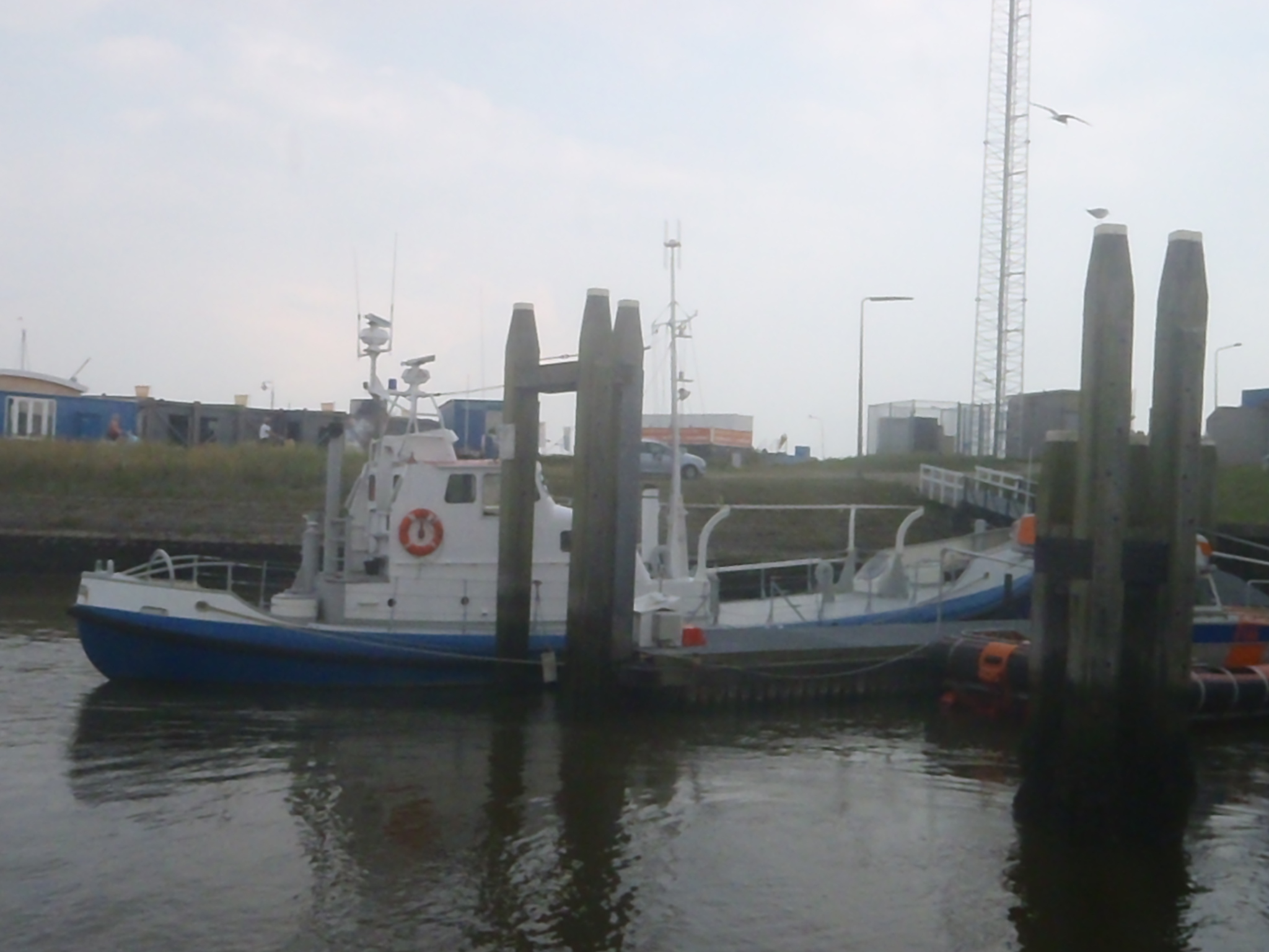 de suzanna